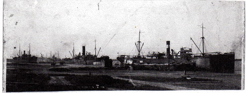 Кілійський порт, зображення кінця 19-го століття